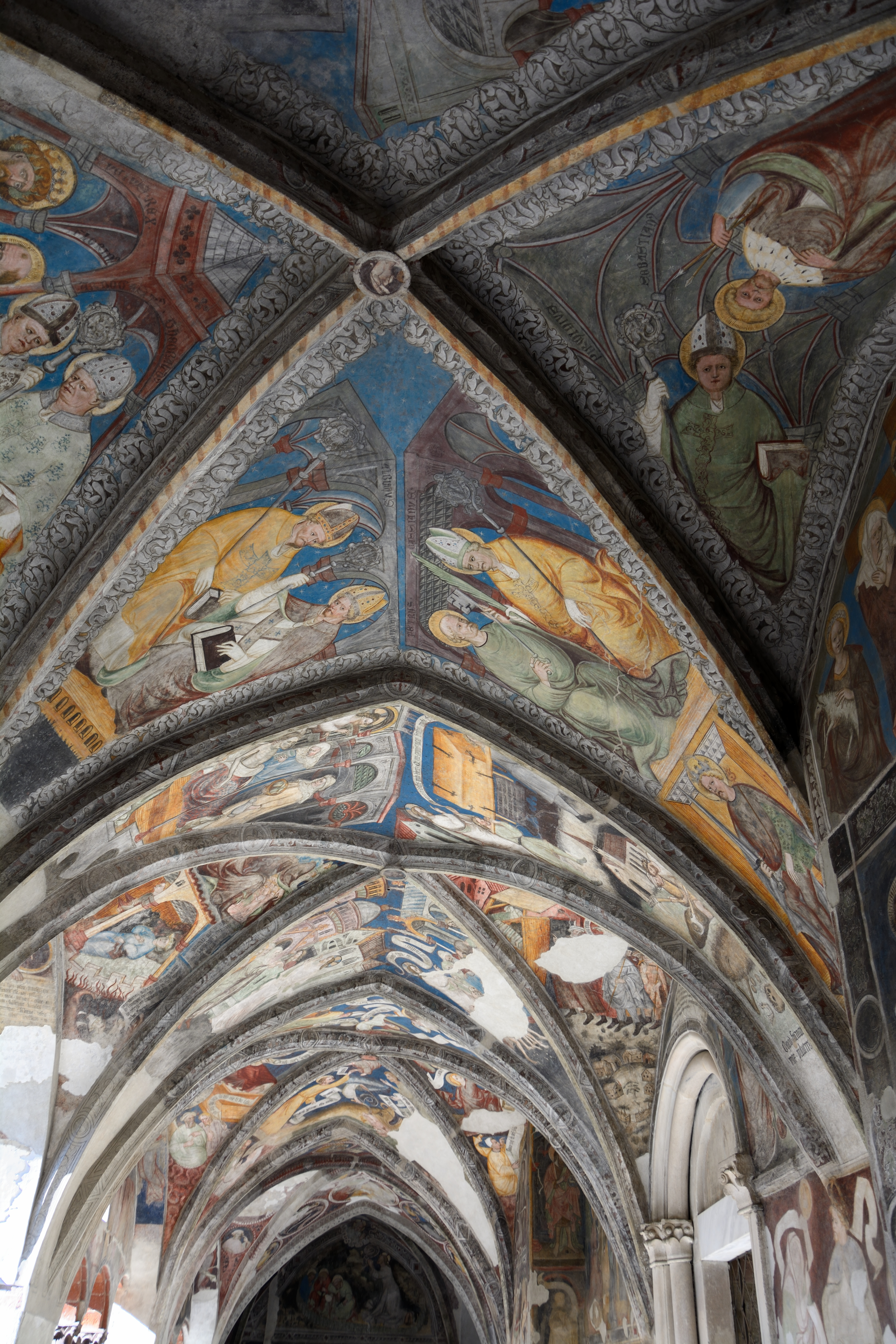 Fresken im Kreuzgang des Brixner Domes an den Gewölben des Nordflügels. Im Vordergrund die 12. Arkade eines unbekannten Meisters, um 1390. Dahinter die Arkaden 11, 10, 9 und 8.